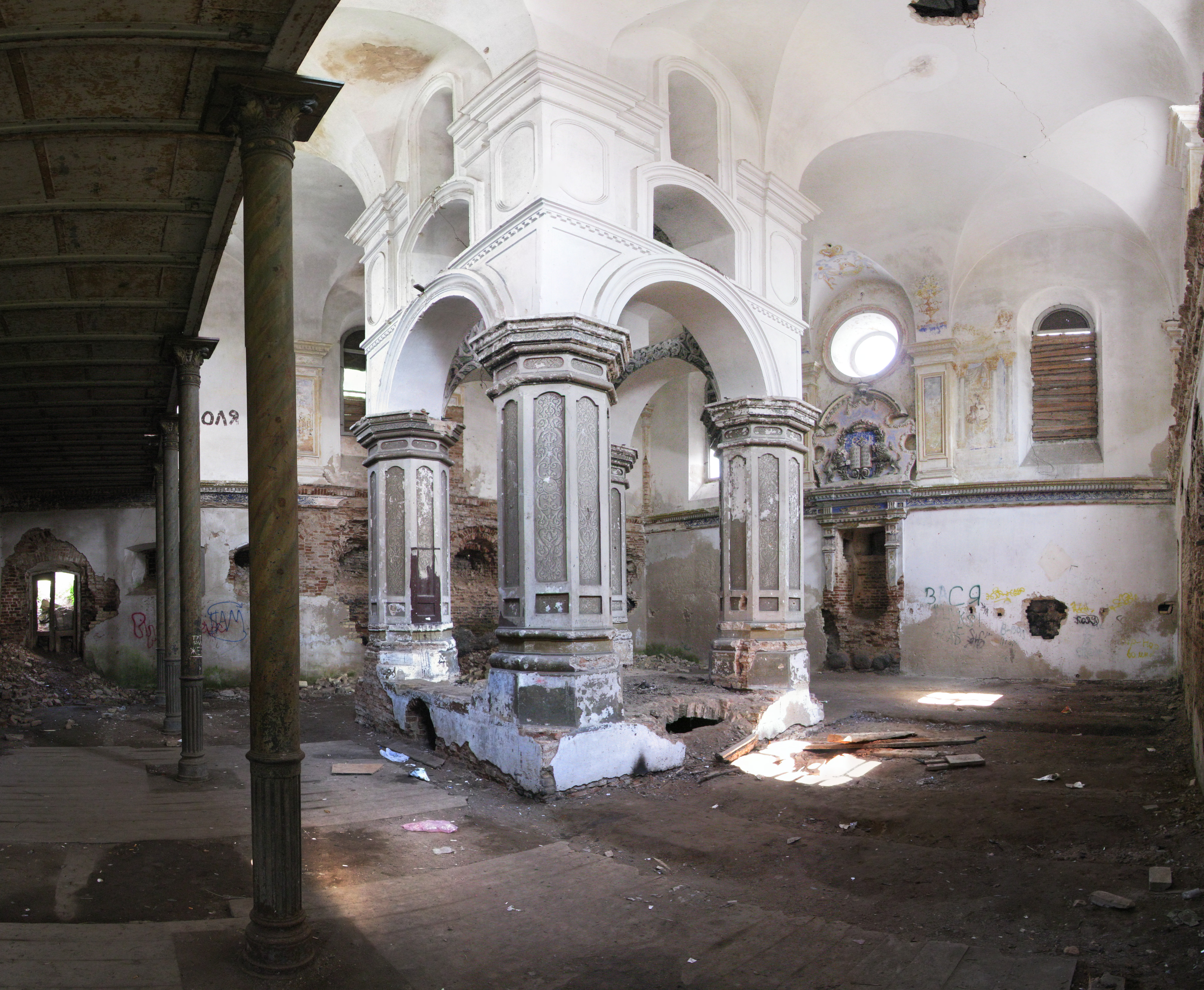 Беларуская (тарашкевіца): Будынак былой сынагогідэкаратыўнае аздабленьне:фрэскавыя кампазыцыі, арнамэнтальная лепка. г. Слонім This is a photo of Belarusian heritage monument. Reference number: 412Г000509 ( WLM)